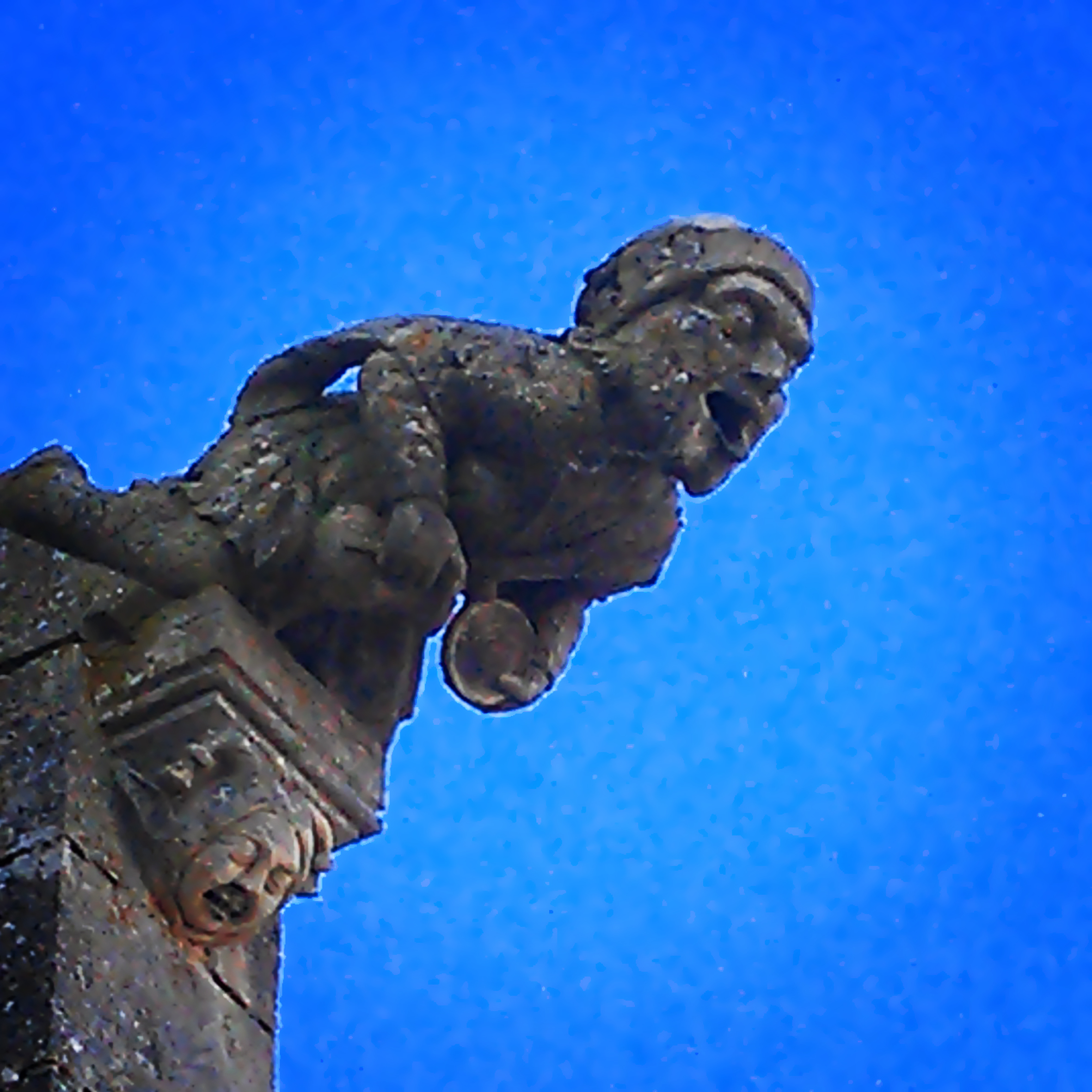 Une des gargouilles de la Basilique Notre Dame de l'Épine, représentant un ivrogne. .